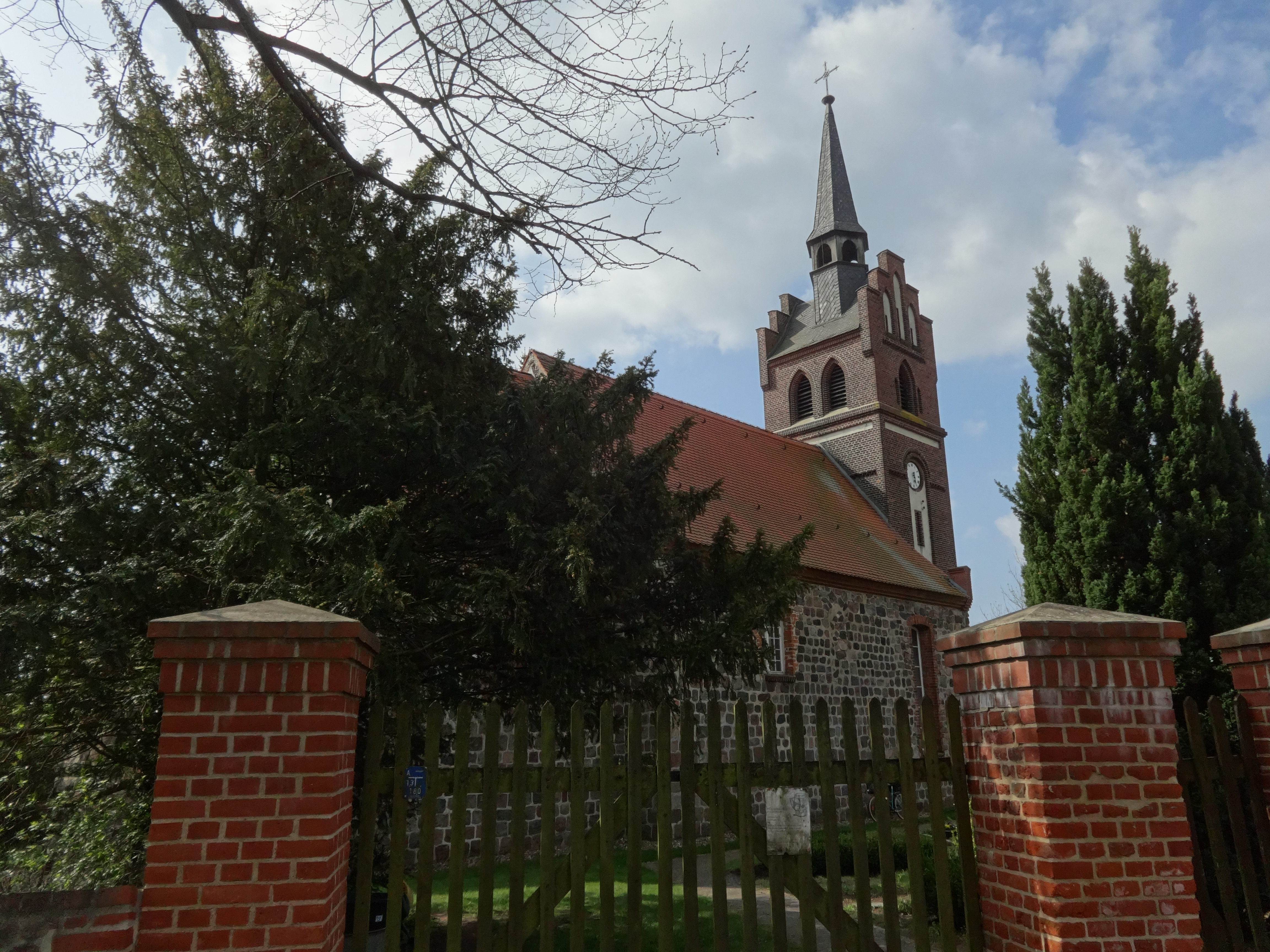 Die Dorfkirche in Münchehofe (Gemeinde Hoppegarten) entstand im 13. Jahrhundert aus Feldsteinen. Die oberen Geschosse des Westturms wurden in der zweiten Hälfte des 19. Jahrhunderts aus Mauerstein erneuert. Im Innern befinden sich unter anderem ein Kanzelaltar aus dem 18. Jahrhundert mit Bildern Jesu Christi und den Evangelisten.